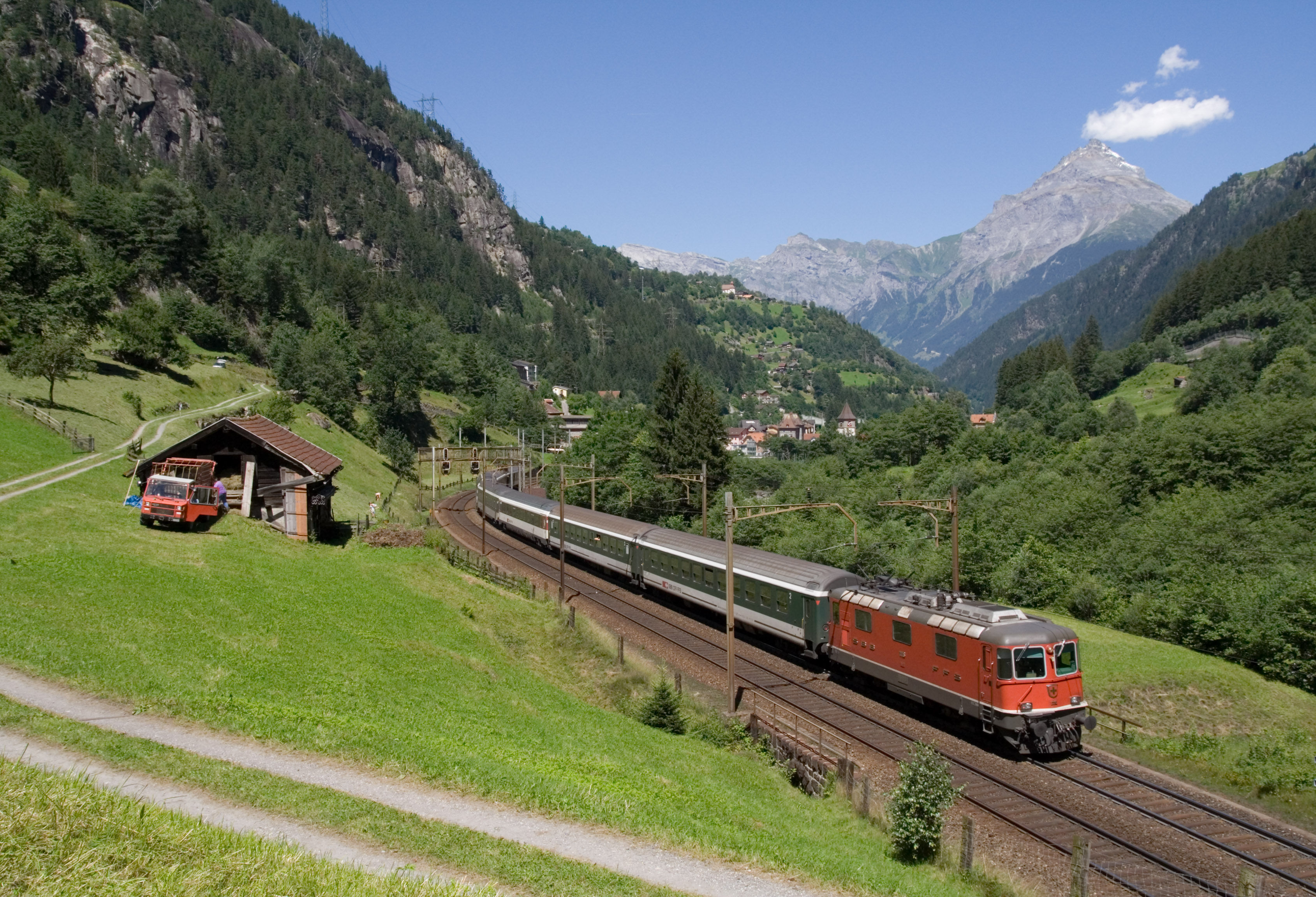 Gotthard-Interregio kurz nach Gurtnellen / Gotthard interregio train after Gurtnellen